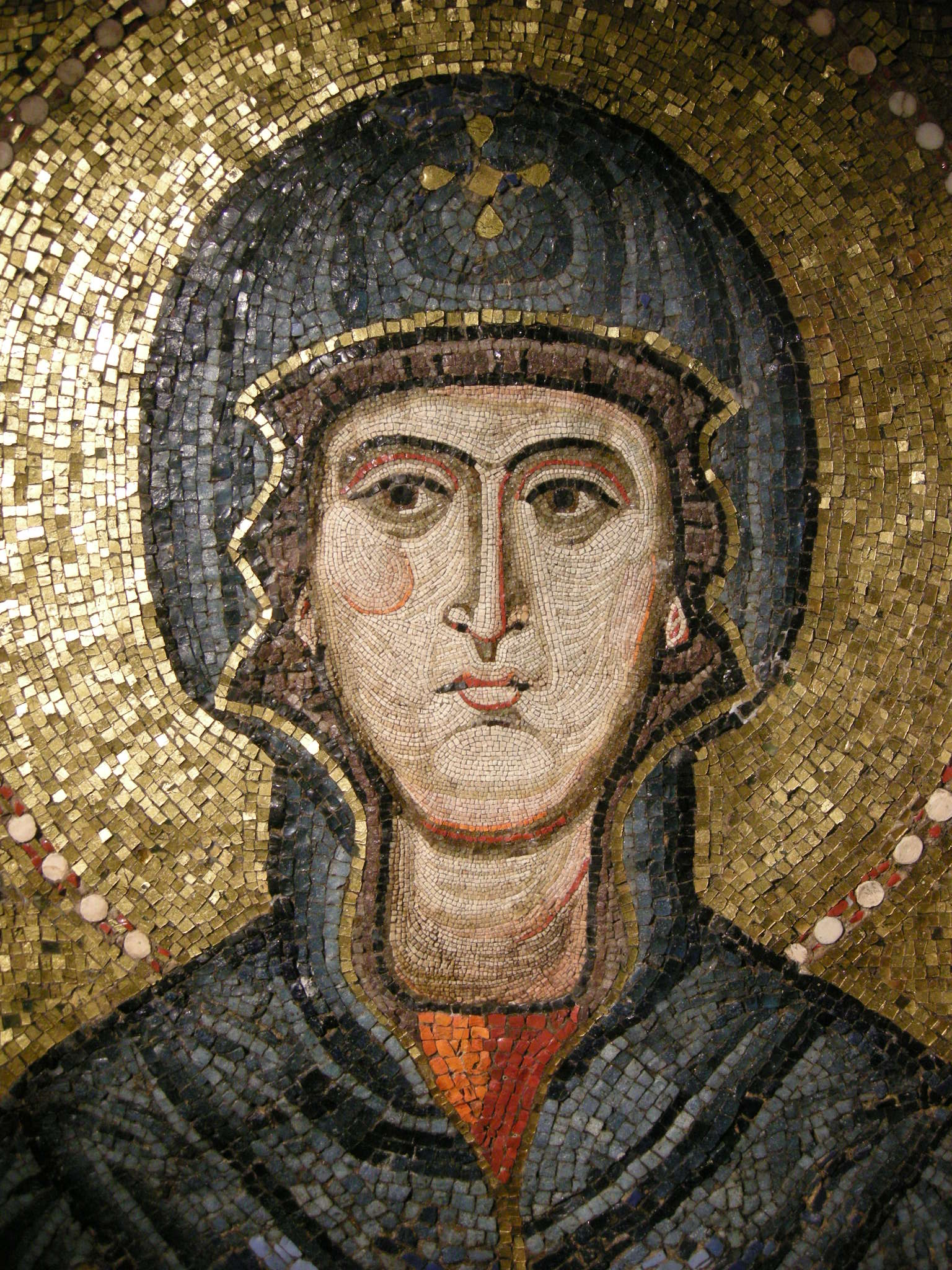 Madonna. Mosaico di arte costantinopolitana, della fine dell'XI/inizio del XII secolo. Esposto nel Museo civico medievale a Bologna.